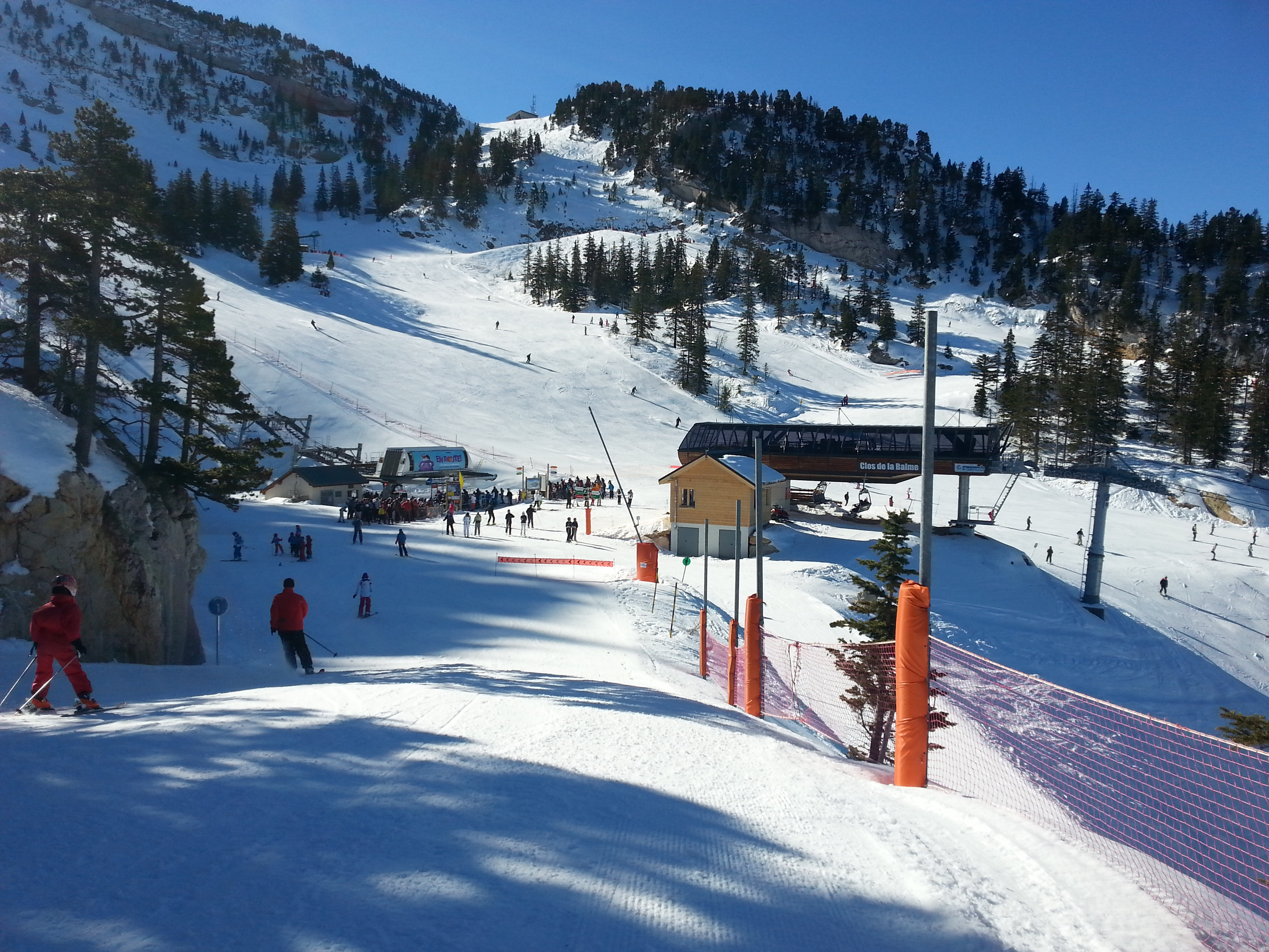 Espace Villard-Corrençon (38) : Le secteur du Clos de la Balme, à 1600 m d'altitude.